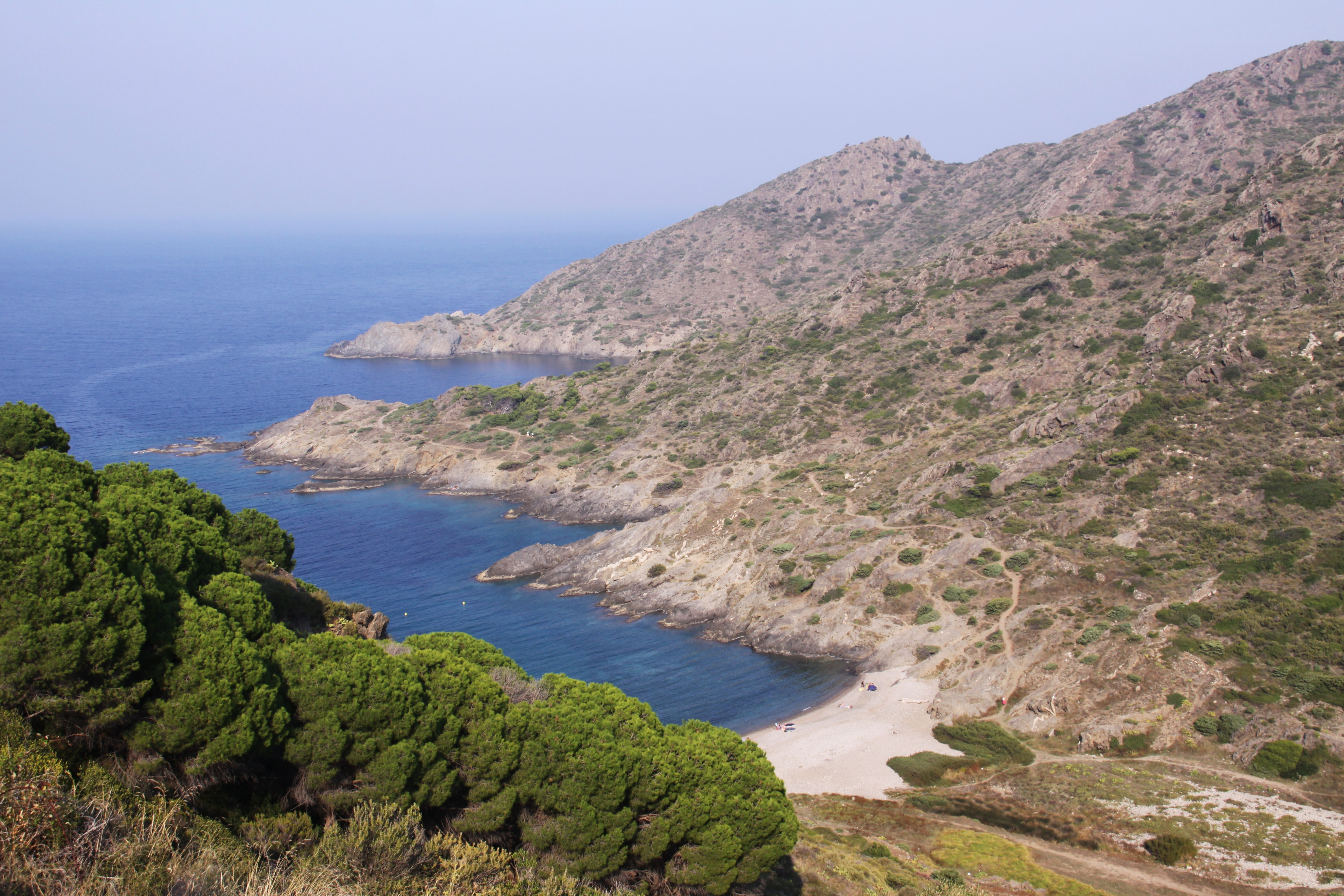 La Cala Tamariua est située près de la Punta de la Creu (Pointe de la Croix) et du lotissement "La Tamariua". C' est dans cette crique que commence le Parc Natural del Cap de Creus (Parc Naturel du Cap de Creus). Cala: crique. El Port de la Selva, Catalogne, Espagne.